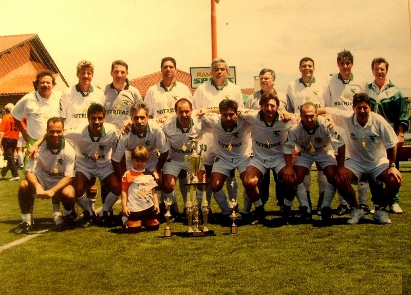 Foto do Torino Campeão Estadual de Futebol Sete